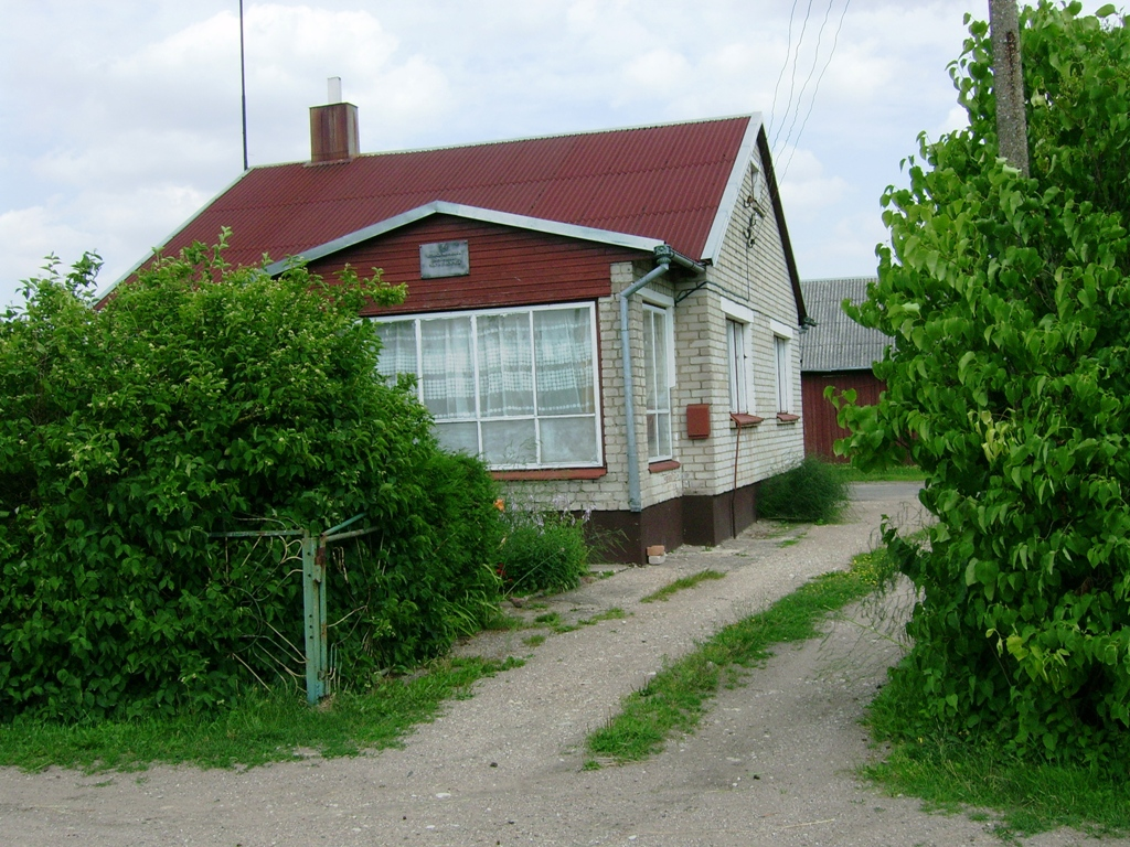 Sungailiškių mokykla